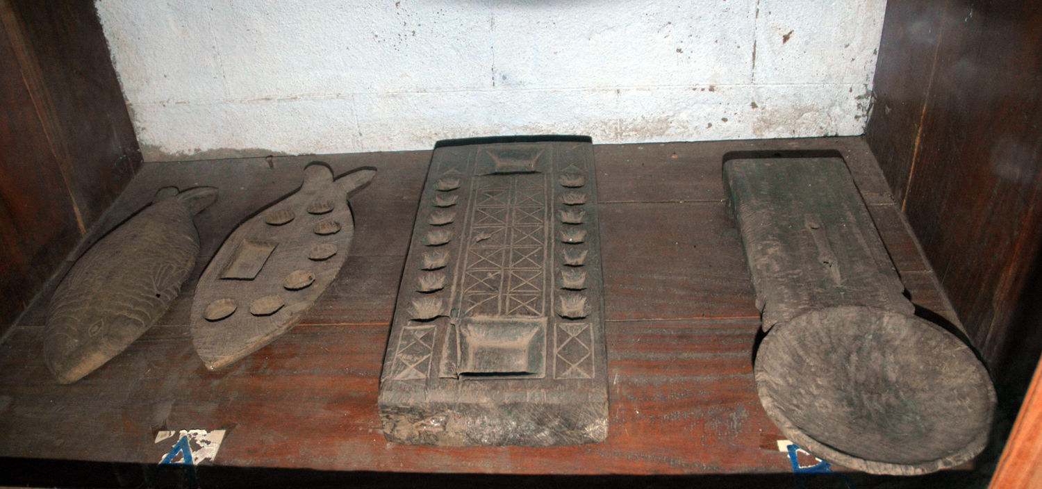 துருவு பலகையின் அடித்தளம் - தொல் பொருட்காட்சிச்சாலை, யாழ்ப்பாணம்